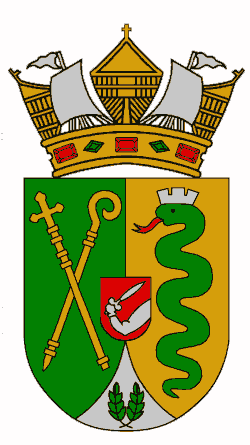 Escudo de Culebra (Puerto Rico)